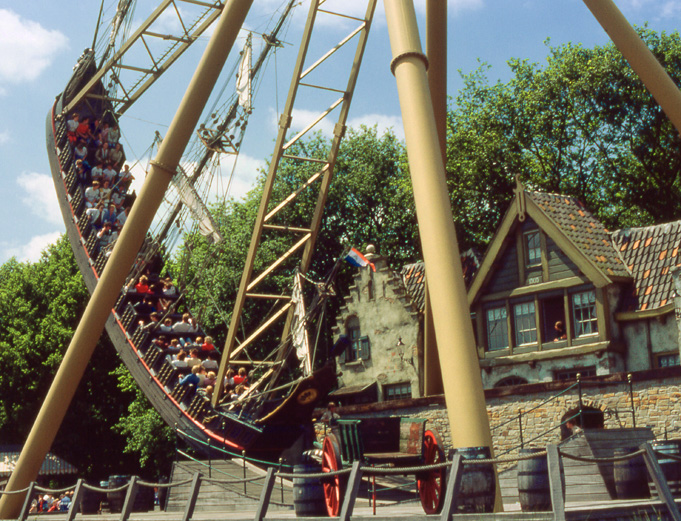 Schommelschip Halve Maen in attractiepark de Efteling